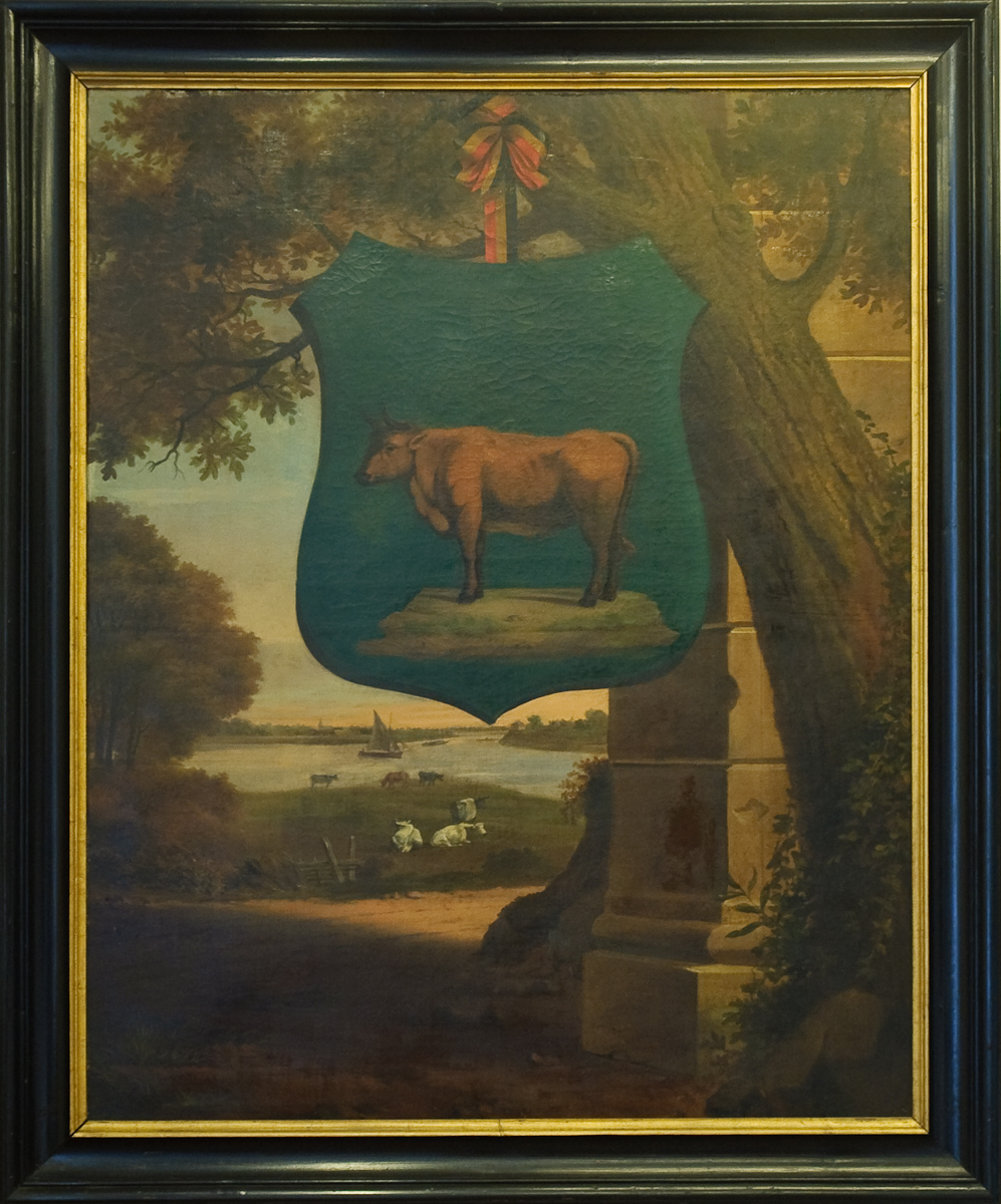 Quirinus van Amelsfoort en Franciscus Johannes de Groot, Het district Maasland, 1804-1805 Quirinus van Amelsfoort en Franciscus Johannes de Groot Het District Maasland